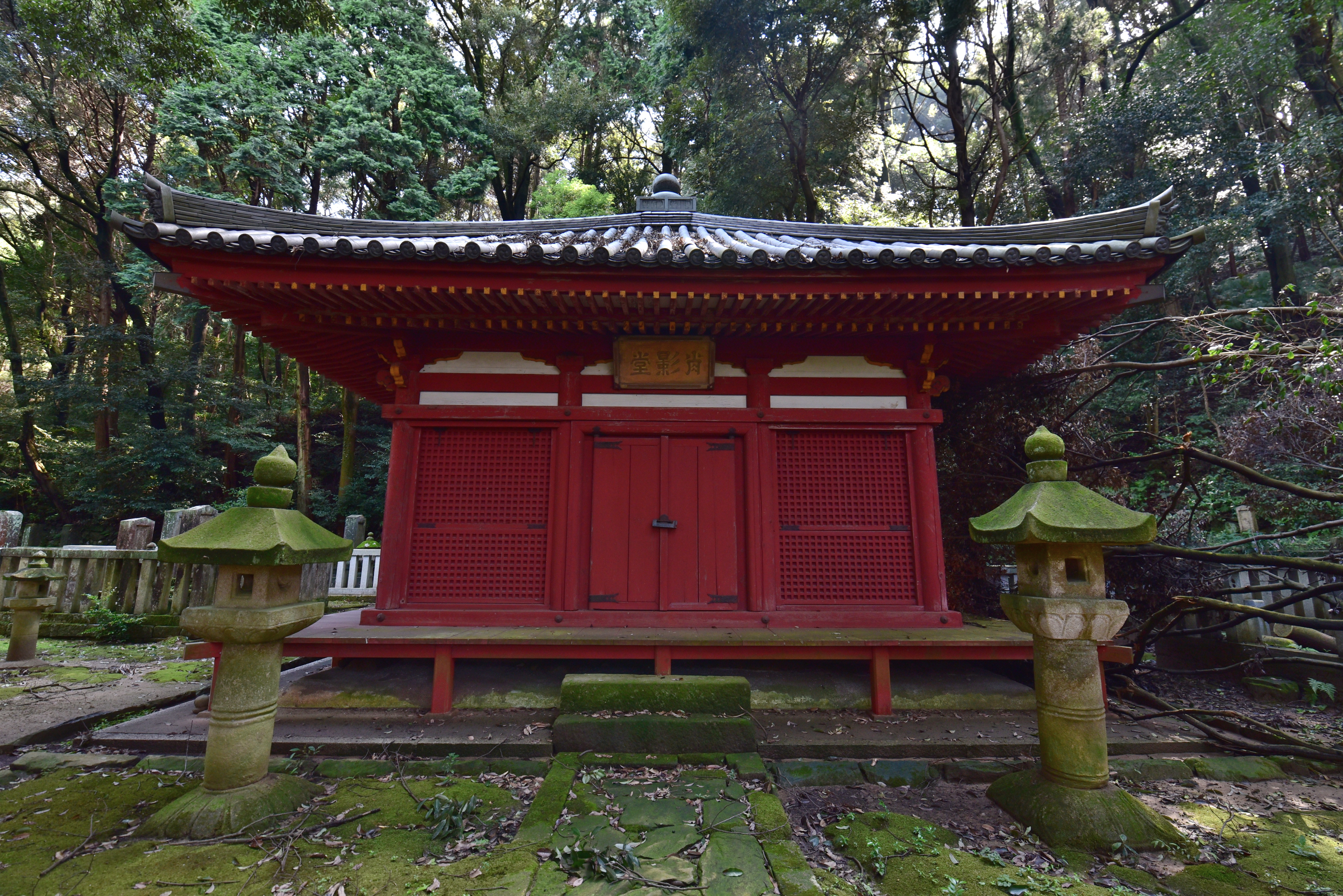 長圓寺肖影堂 Nikon D750